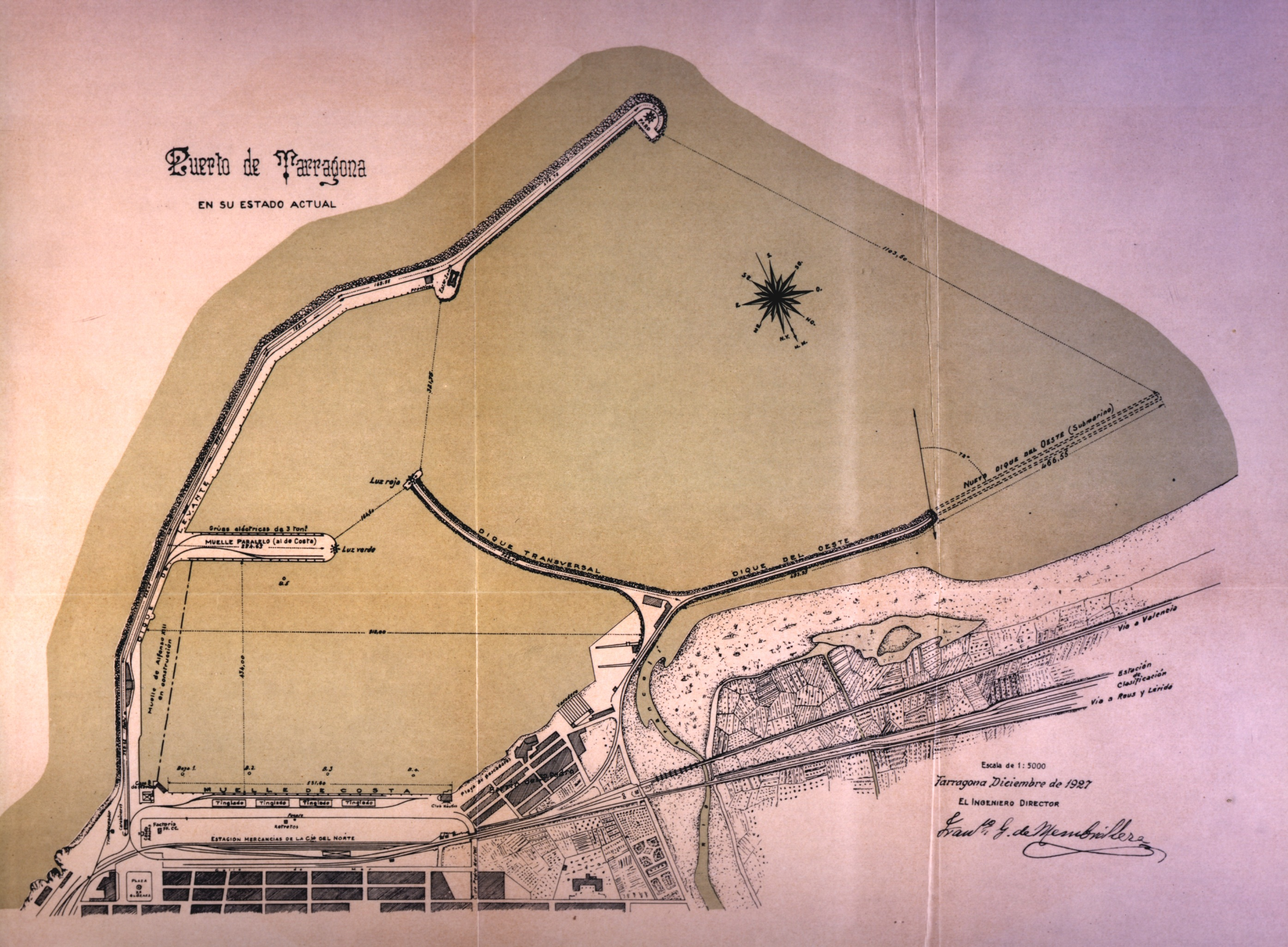 Puerto de Tarragona en su estado actual, Tarragona diciembre 1927. Fco. G. de Membrillera.